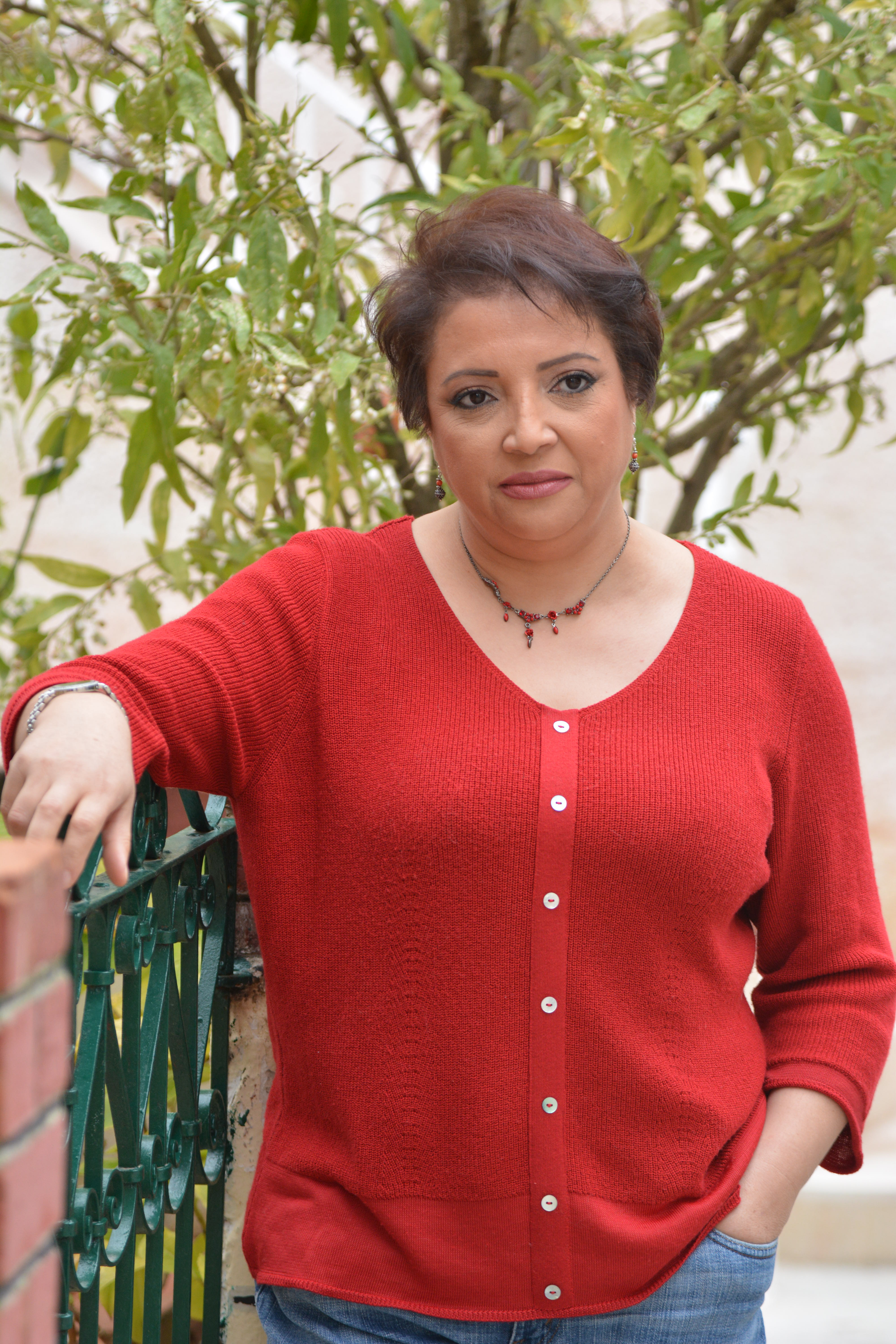 Fadhila El farouk